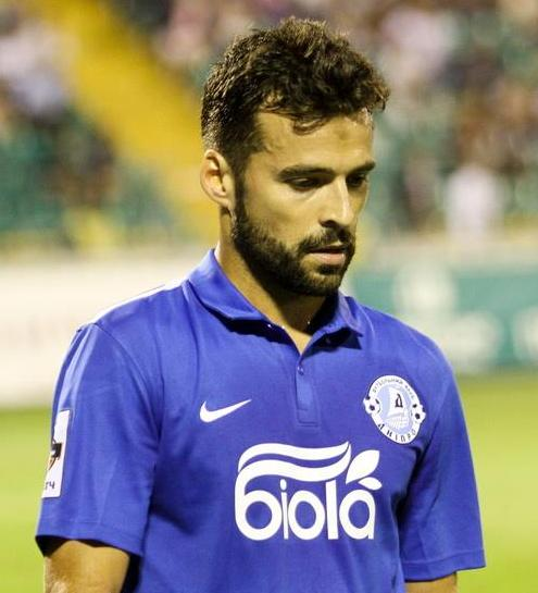 Бруну Гама - футболіст Дніпра